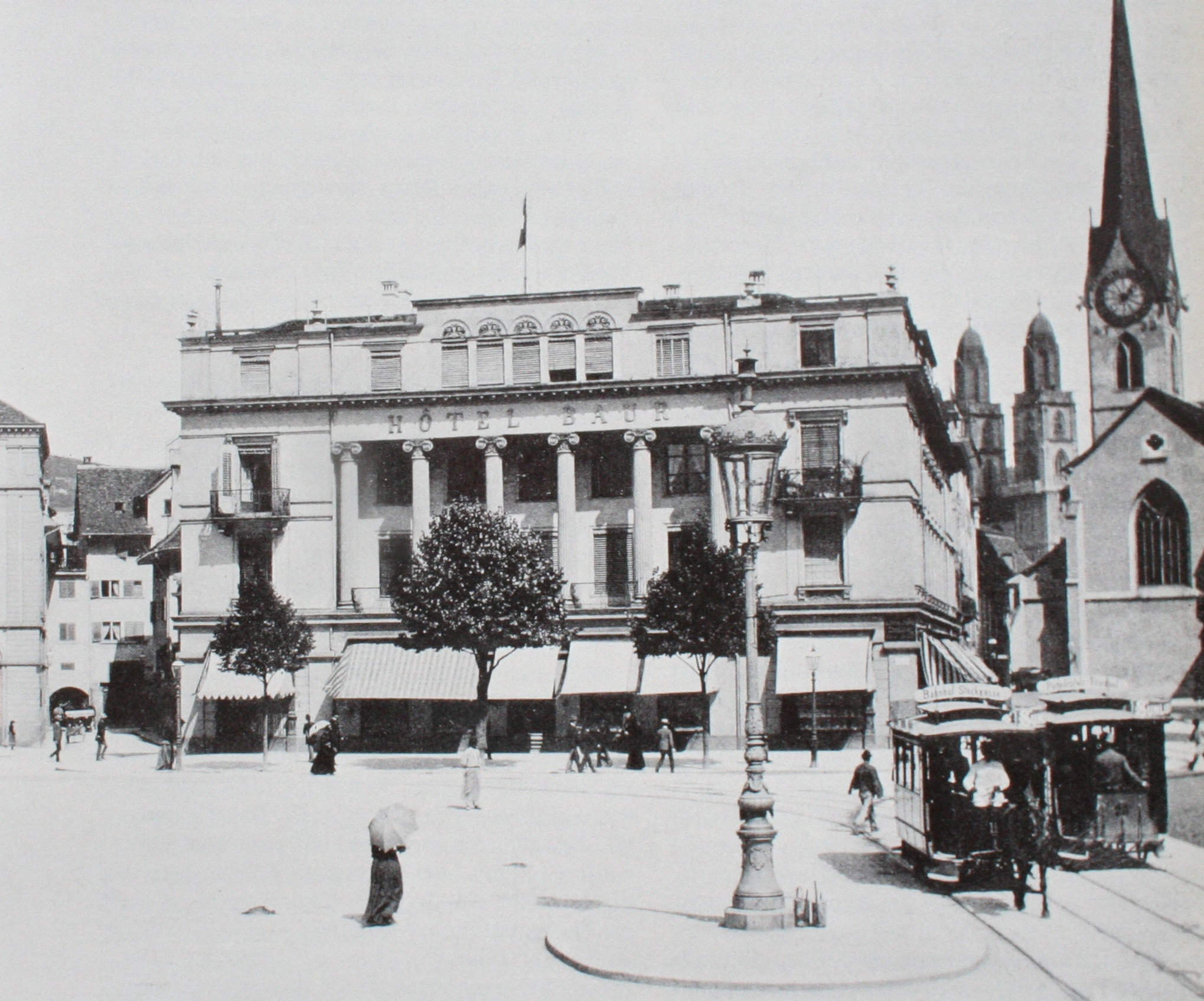 Paradeplatz Zürch, Hotel Baur um 1890